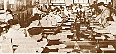 Sidang Resmi "Panitia Persiapan Kemerdekaan Indonesia" (PPKI).